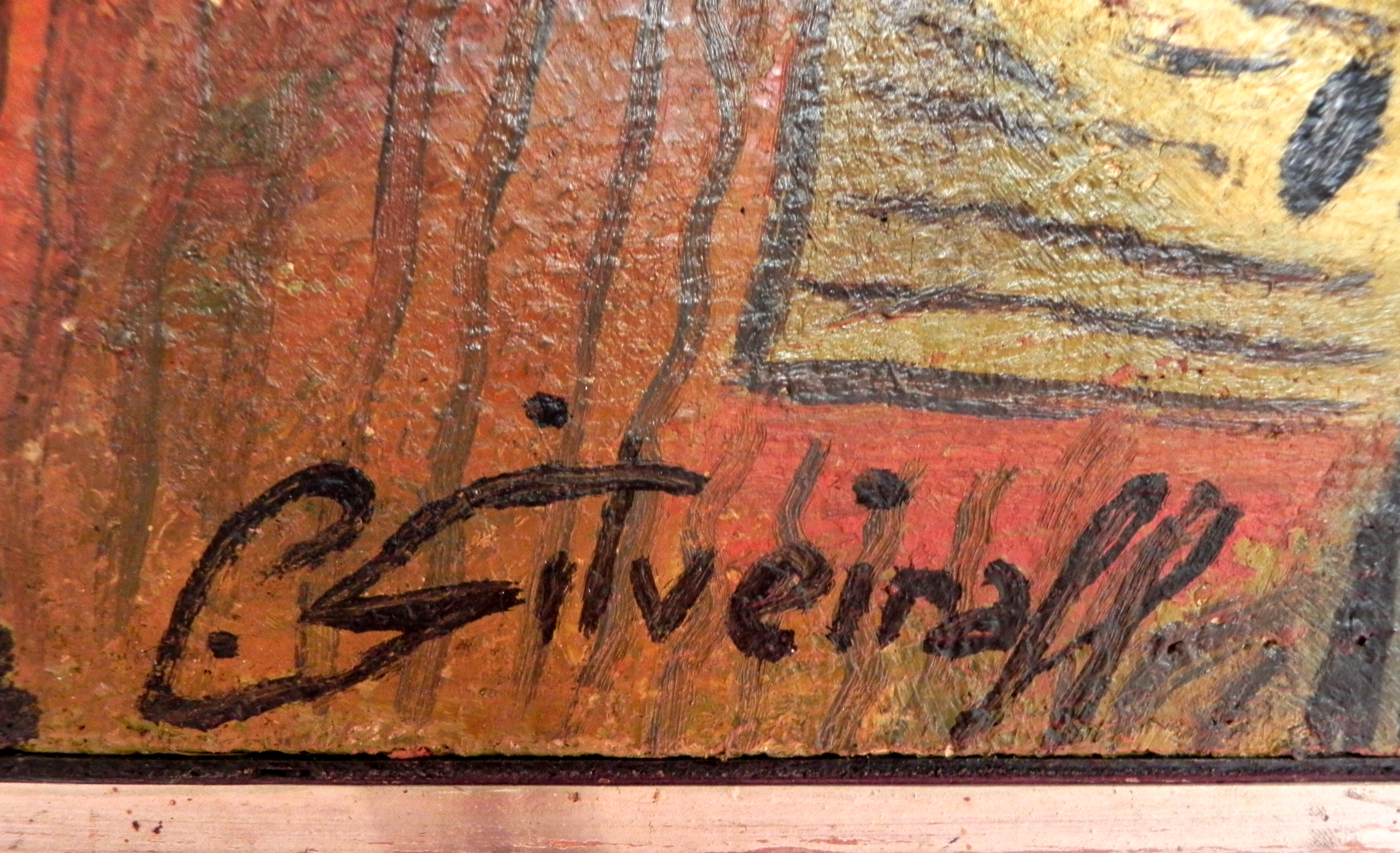 Paisaje o Canal de riego, 1968. Óleo sobre lienzo, 90 x 121 cm. Detalle de la firma. Guillermo Silveira García (1922–1987) Description painter, sculptor, military personnel and art educatorDate of birth/death 11 January 1922 11 May 1987Location of birth/death Segura de León BadajozWork periodcirca 1945-1987Work location BadajozAuthority control : Q5888937 VIAF: 100940319 ISNI: 0000 0000 7827 0108 GND: 139488154 BNE: XX4841676 creator QS:P170,Q5888937